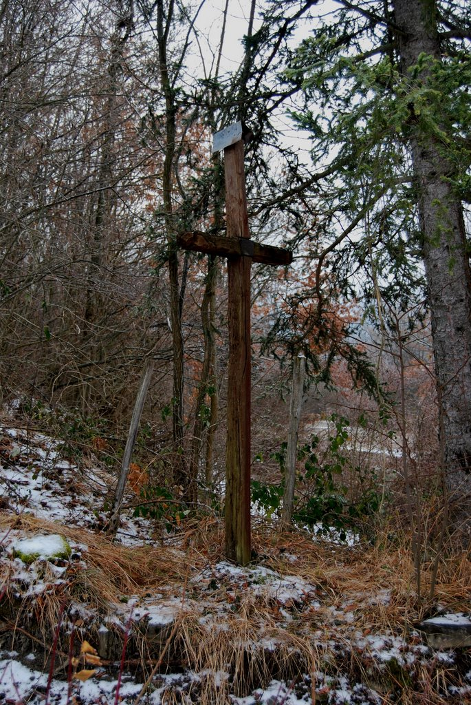 Croce posata a Coletta di Groppallo durante la Missione Campestre avvenuta in parrocchia tra il 23 e il 30 ottobre 1949